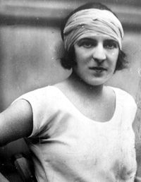 Suzanne Lenglen († 1938). Suzanne Lenglen.